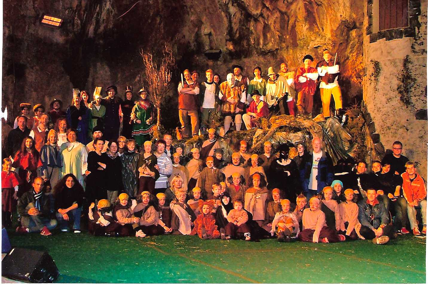 Ensemble Balver Märchenwochen in 2004